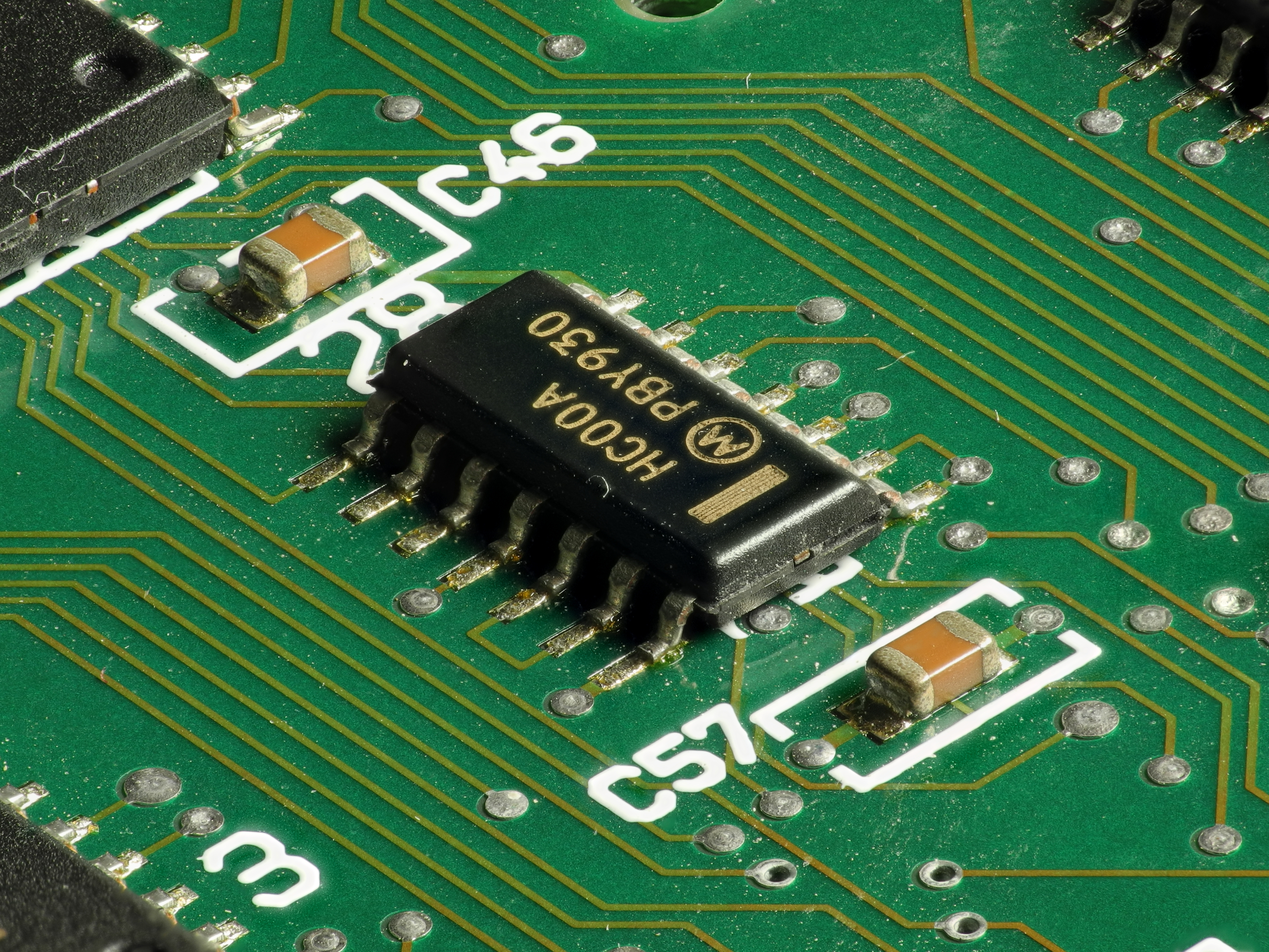 Focus stacking of 31 pictures (using Zerene Stacker).Composants électroniques (focus stacking). Image composée de 31 photos prises avec la bonnette Raynox DCR-250 et assemblées avec Zerene Stacker.